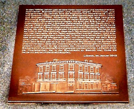 Erweiterung des Denkmals aus demJahre 2015